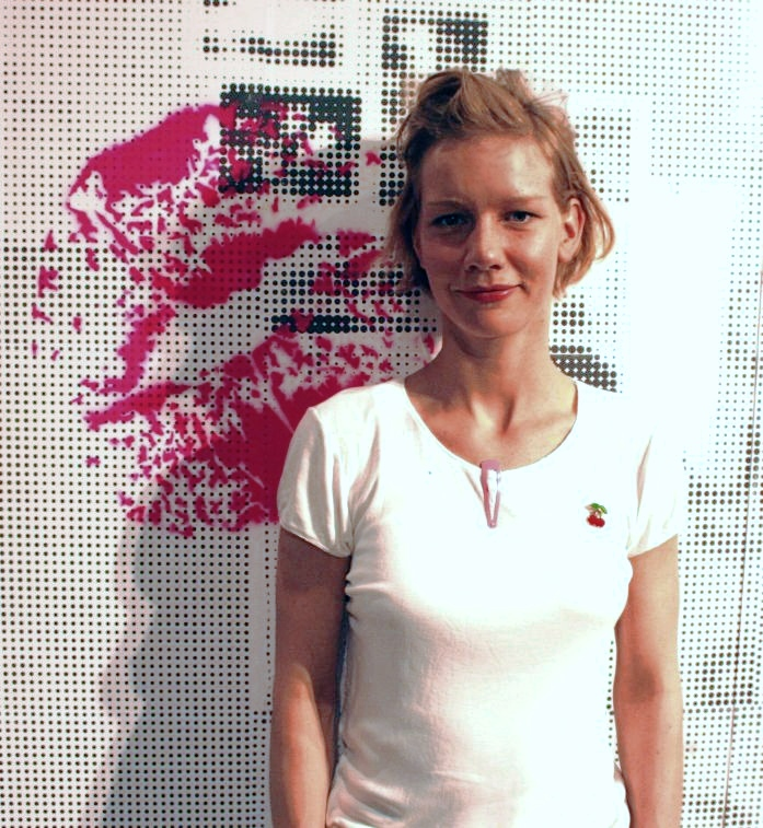 Schauspielerin Sandra Hüller nach einer Aufführung von "For Love" im Heidelberger Jugendtheater Zwinger1